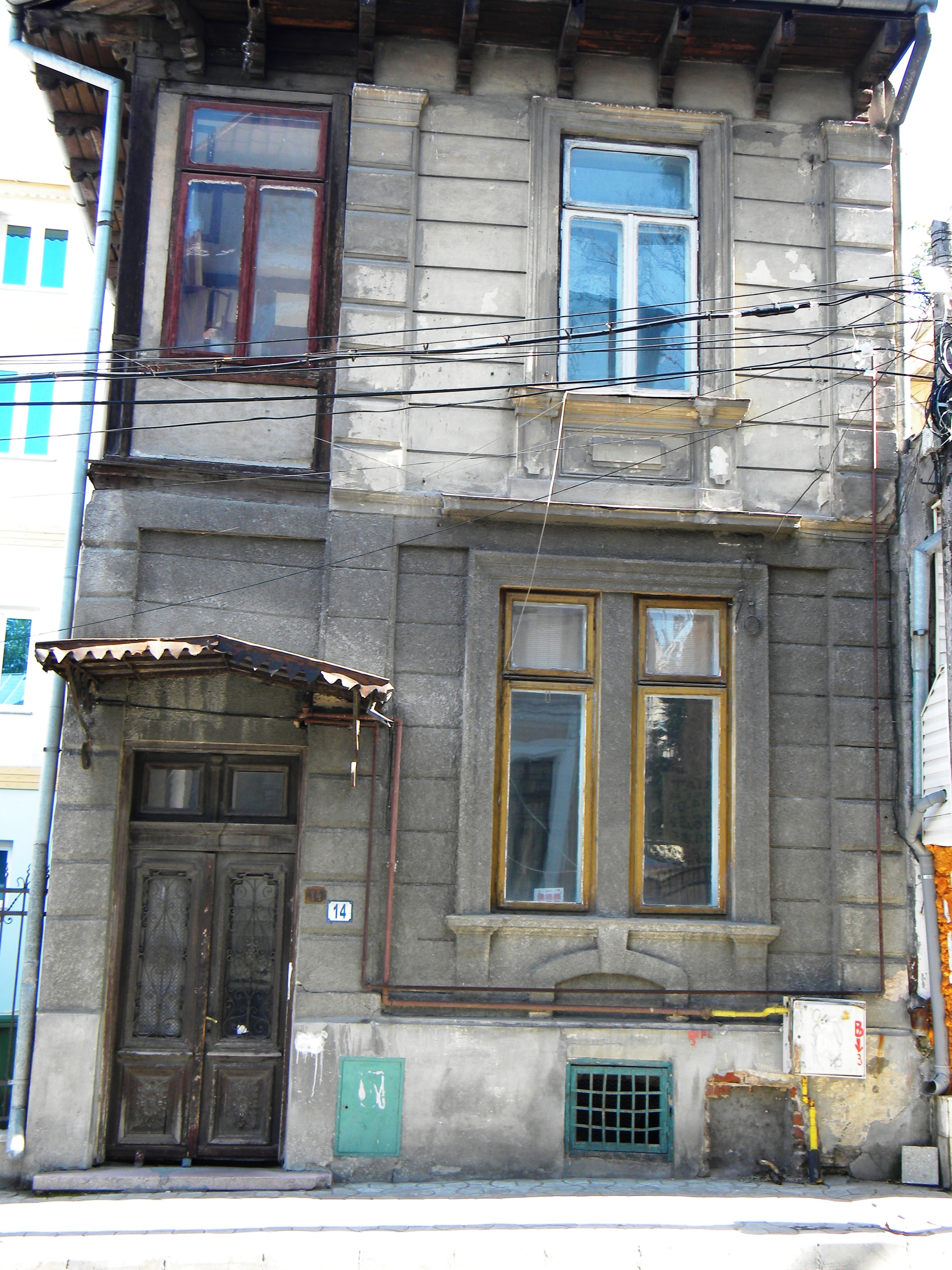 Bucuresti, Romania, Casa pe Str. Iulia Hasdeu nr.14, sect. 1